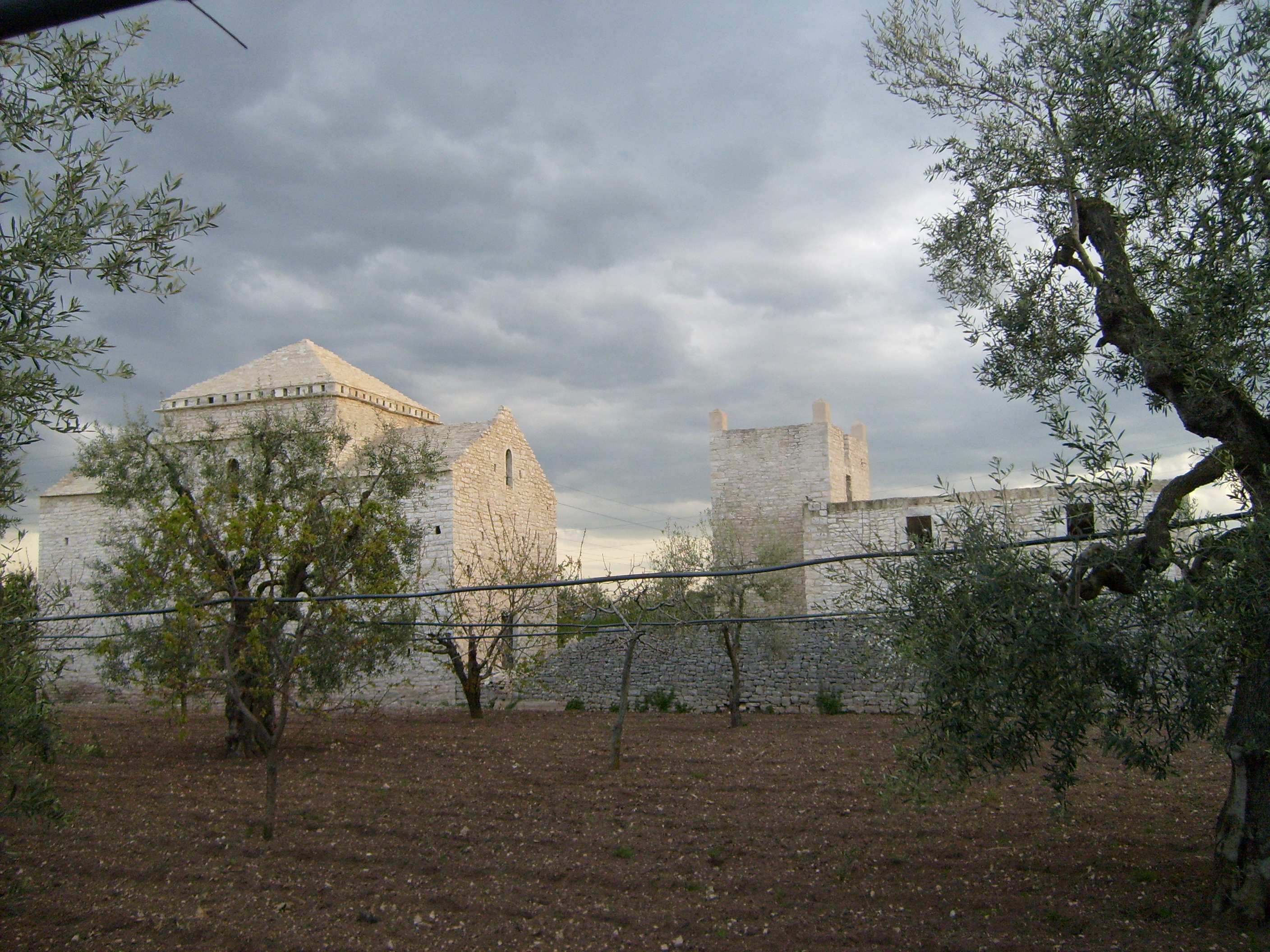 Scorcio del Casale tra gli ulivi